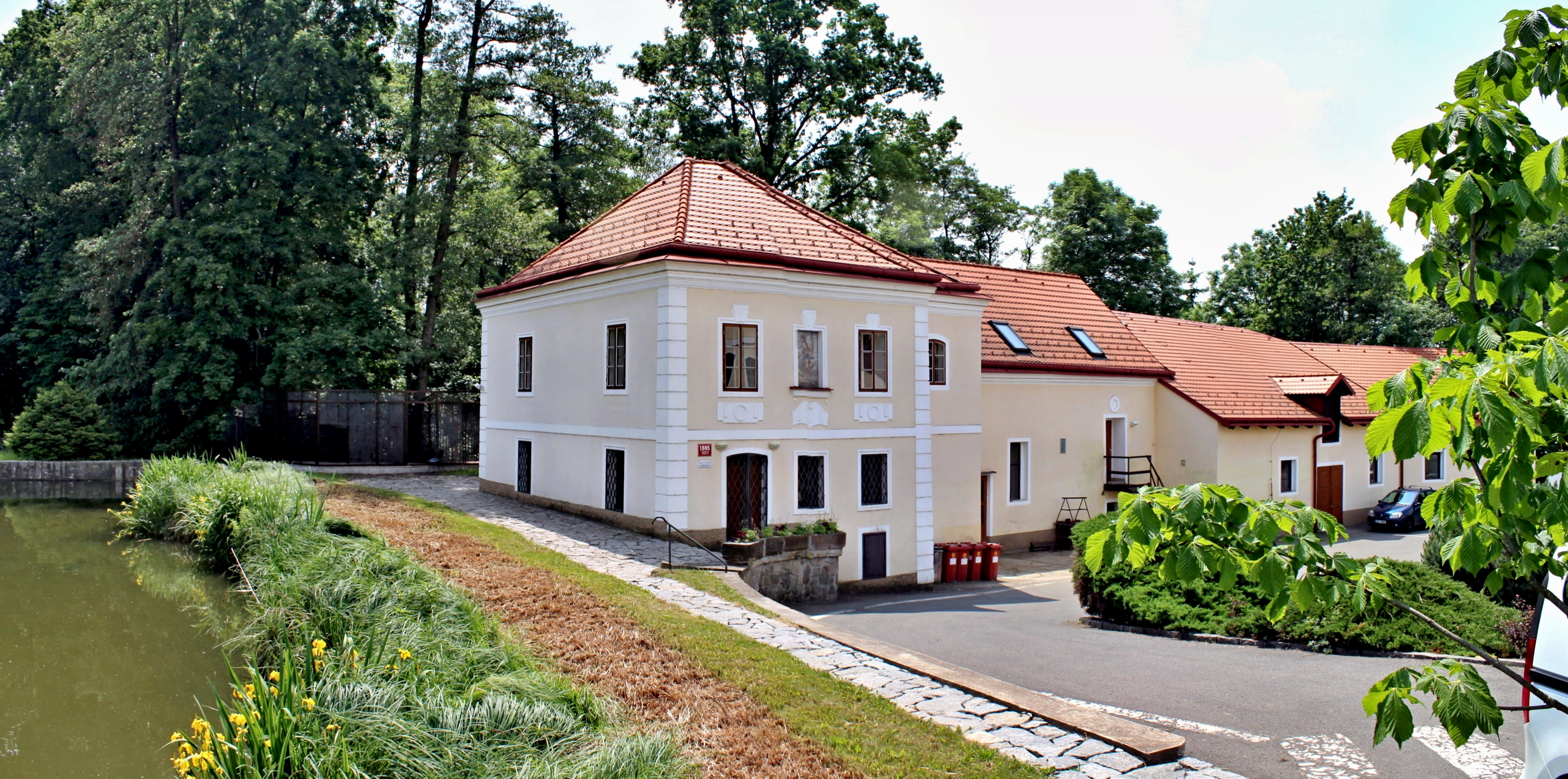 Práčský vodní mlýn